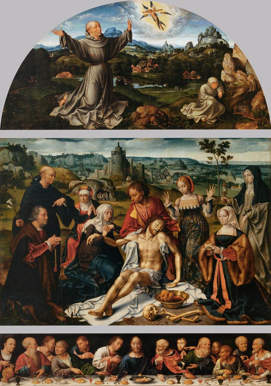 Altarpiece